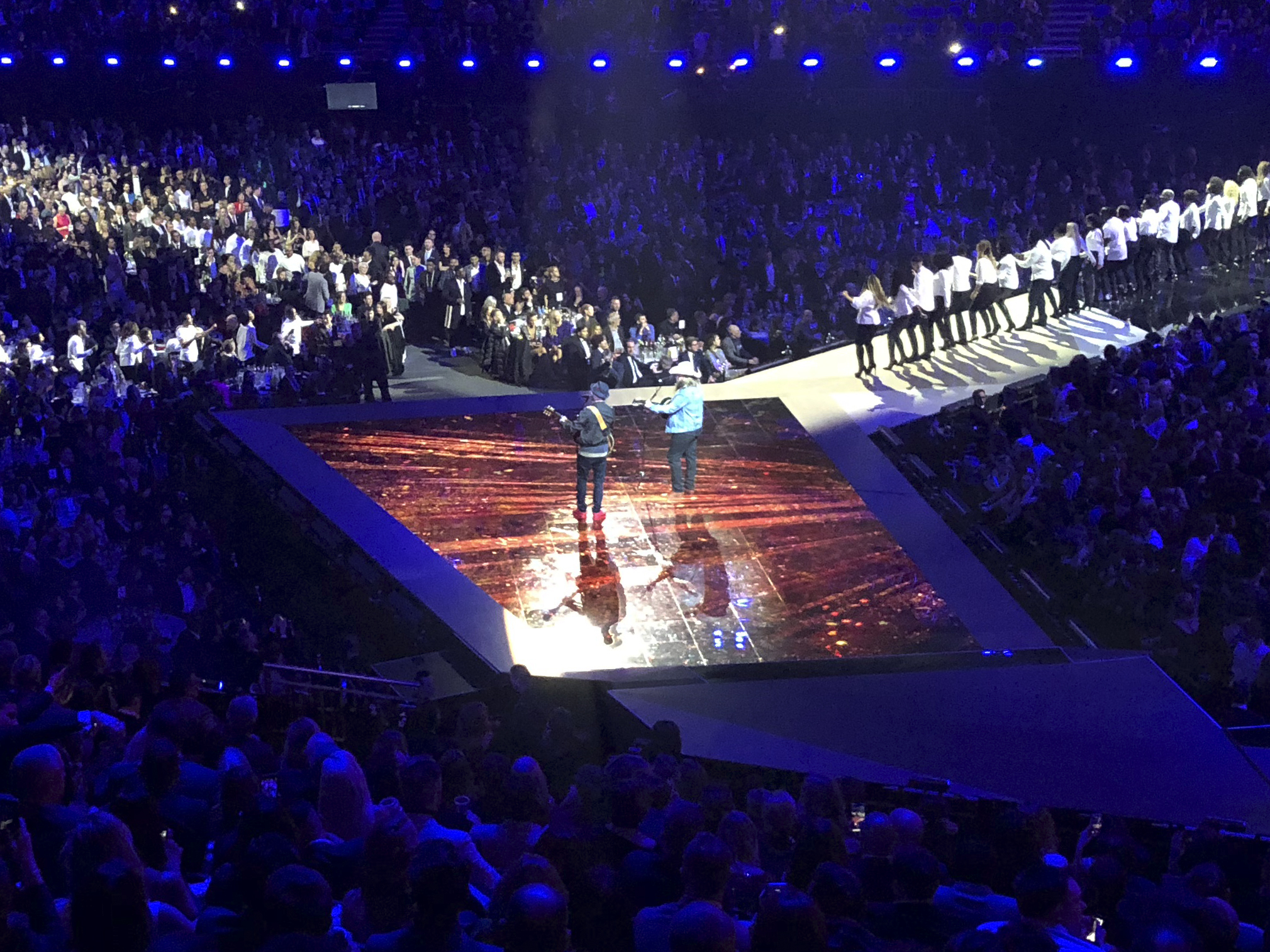 Justin Timberlake y Chris Stapleton interpretando «Say Something» en los premios BRIT Awards del año 2018.